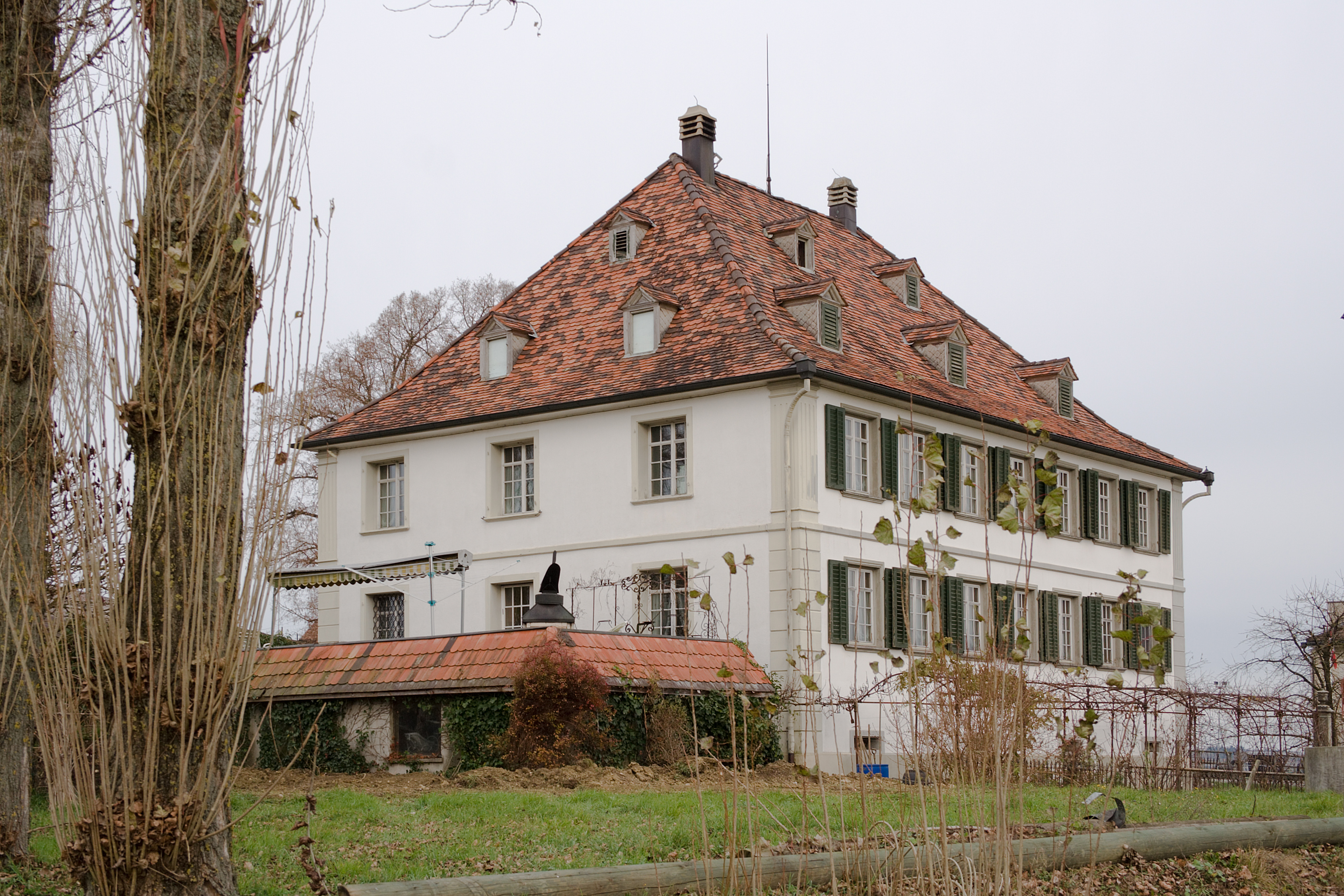 Landsitz in Hessenreuti, Gemeinde Sulgen, Schweiz